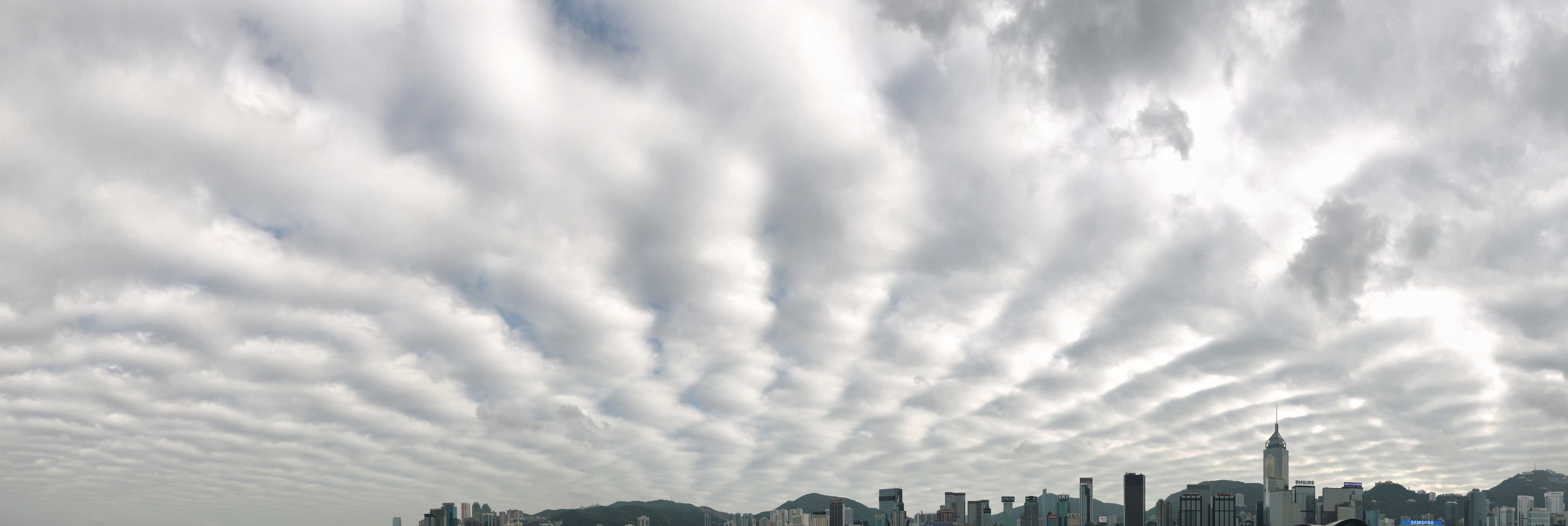 Stratocumulus undulatus